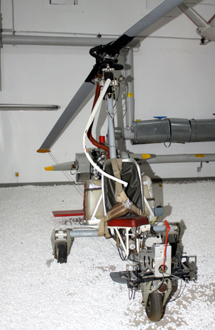 Experimenteller Flugschrauber VFW H-2 im Hubschraubermuseum Bückeburg